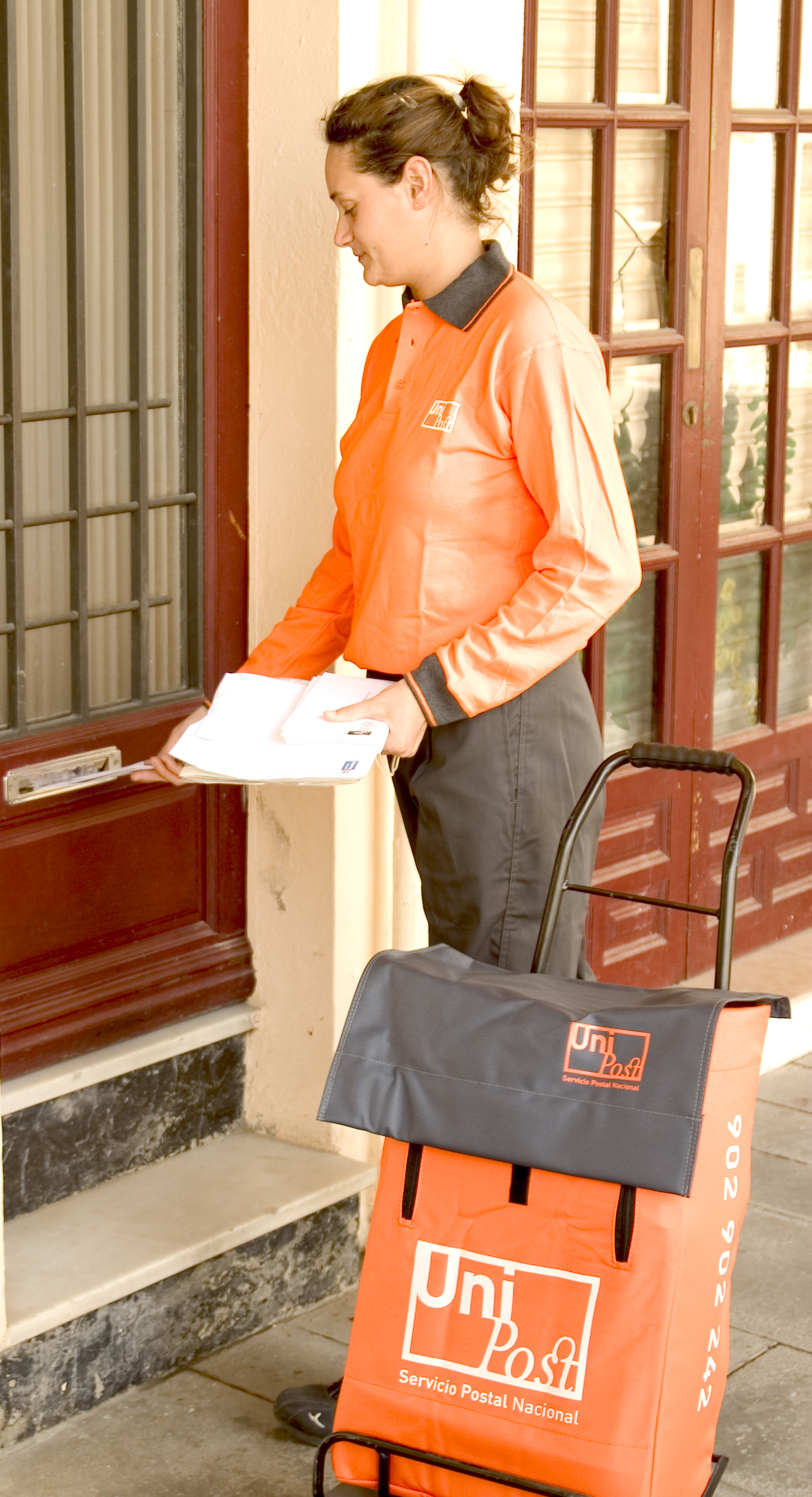 Cartero Naranja